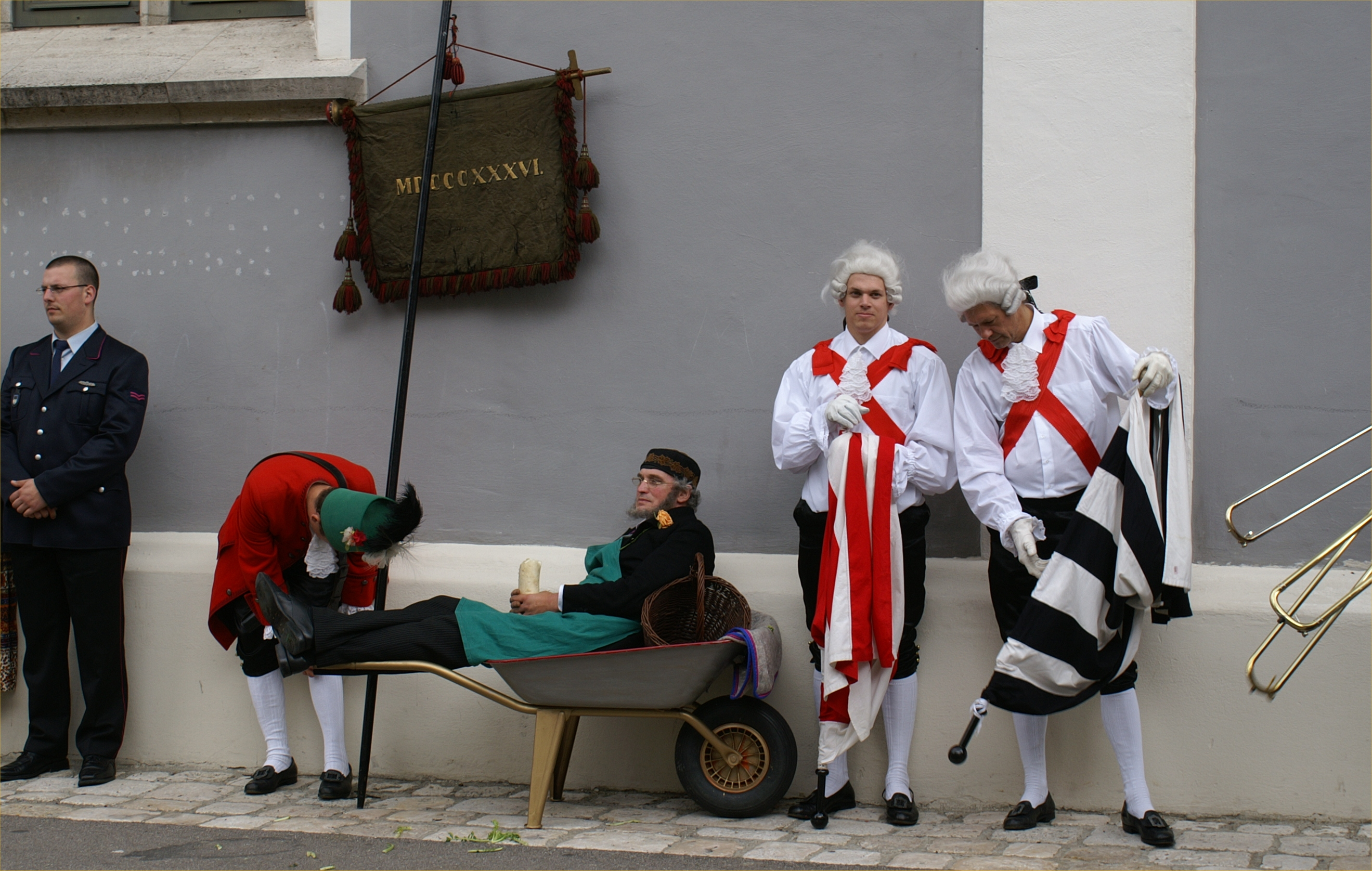 Der Krättenweber, ein bekanntes Ulmer Stadtoriginal, sorgt beim traditionellen Ulmer Fischerstechen für spaßige Unterhaltung beim Festumzug. Zwischendurch gönnt er sich eine Pause und stärkt sich, wie hier beim Rettich-Vesper in seiner Schubkarre